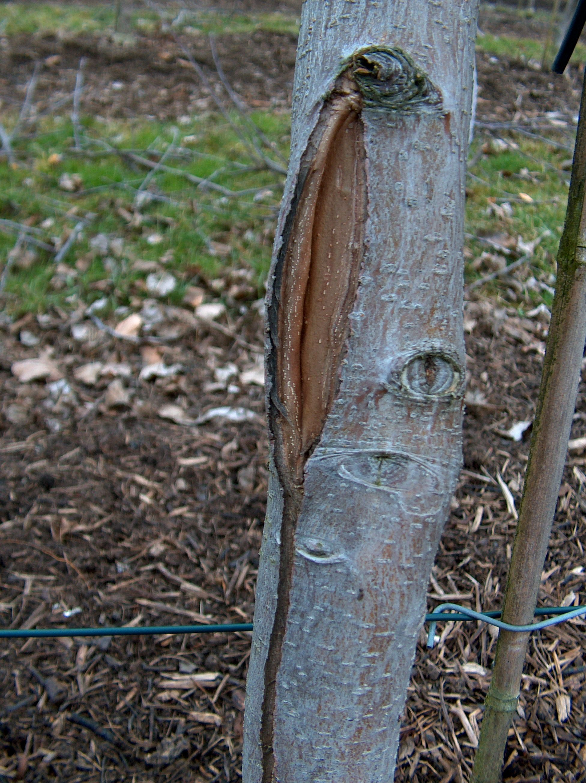 Frostriß an einem Obstbaum (Spindelbusch)